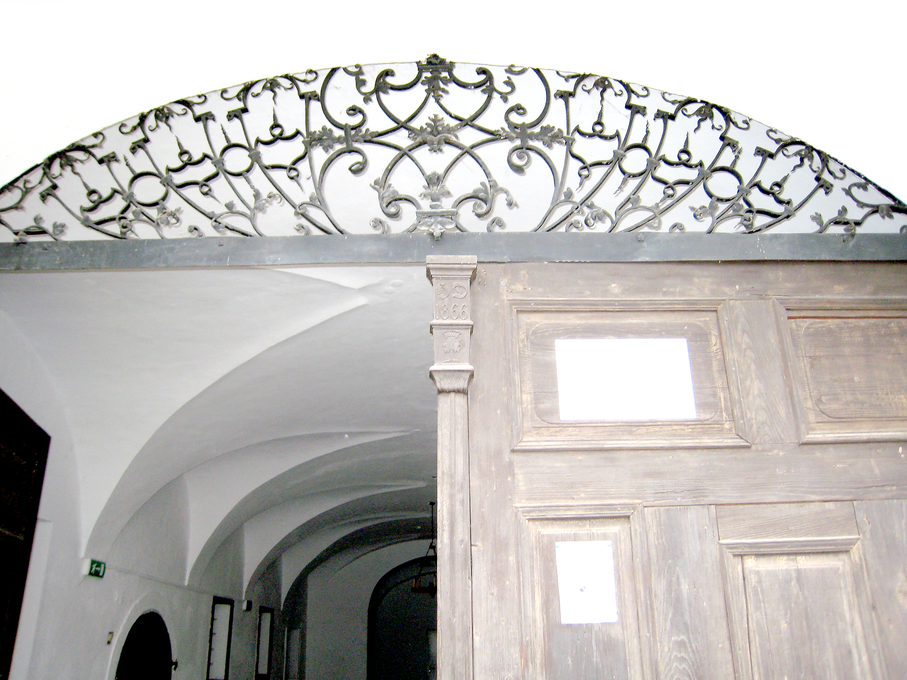 Schloss Neuschloss bei Wundschuh, Eingangsportal